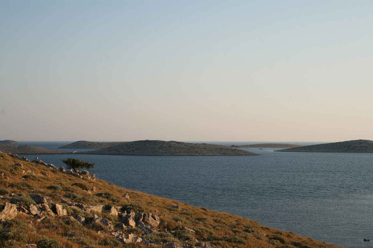 Iles Kornati